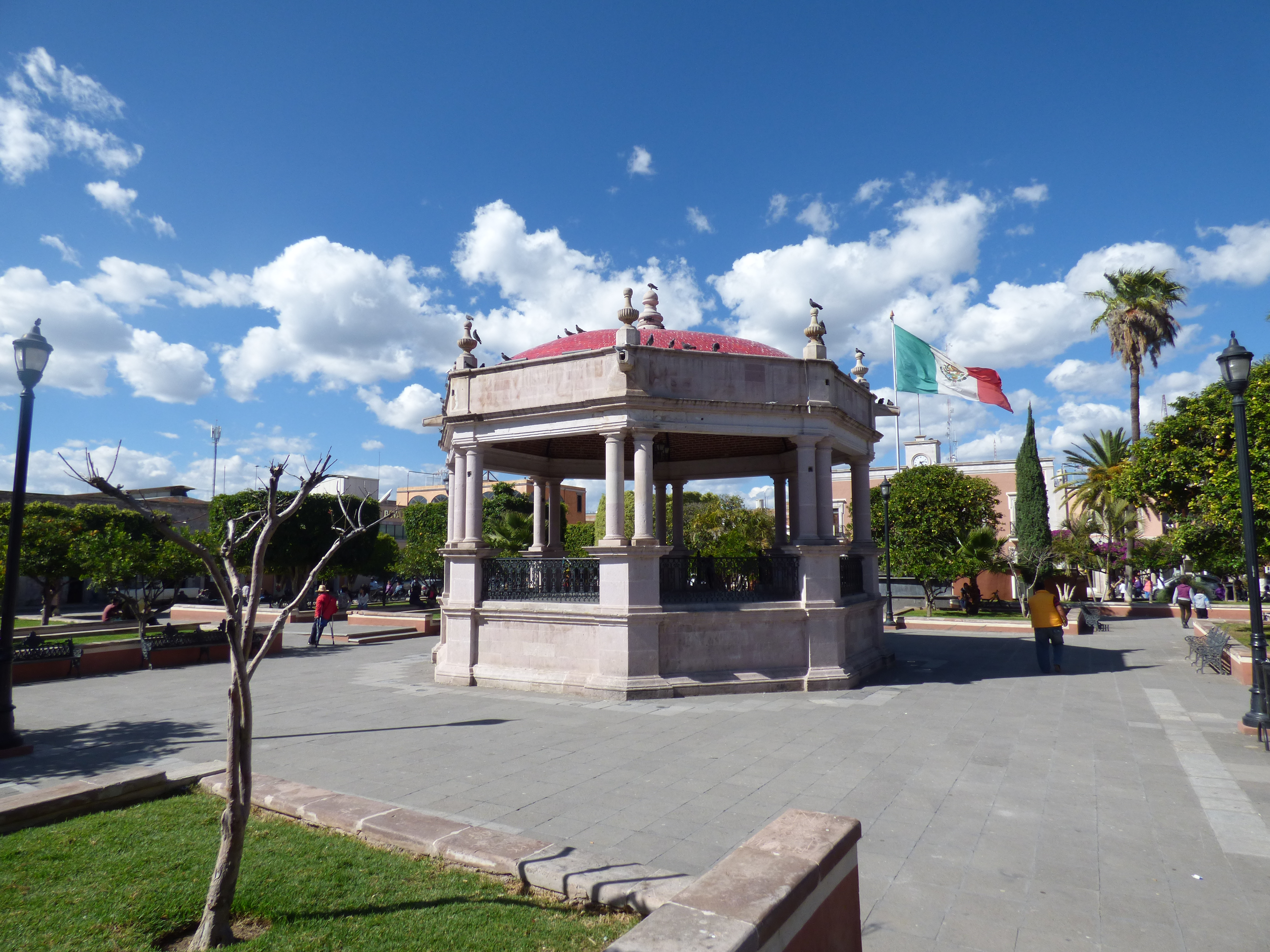 Plaza Principal de Calvillo, Aguascalientes